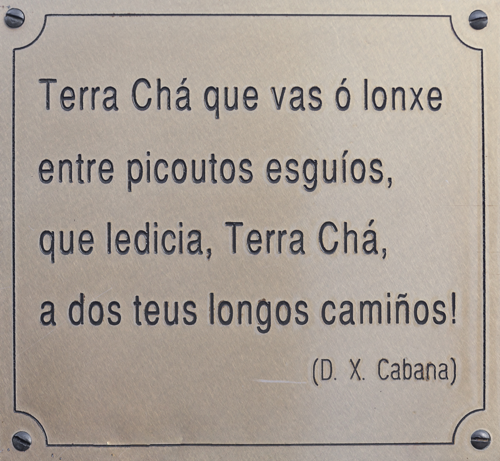 Texto de Darío X. Cabana nunha xardineira en Vilalba. Galiza.